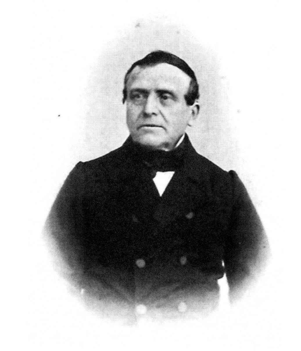 Philipp Mayer (1804-1868), Landtagspräsident Reuß j. L.